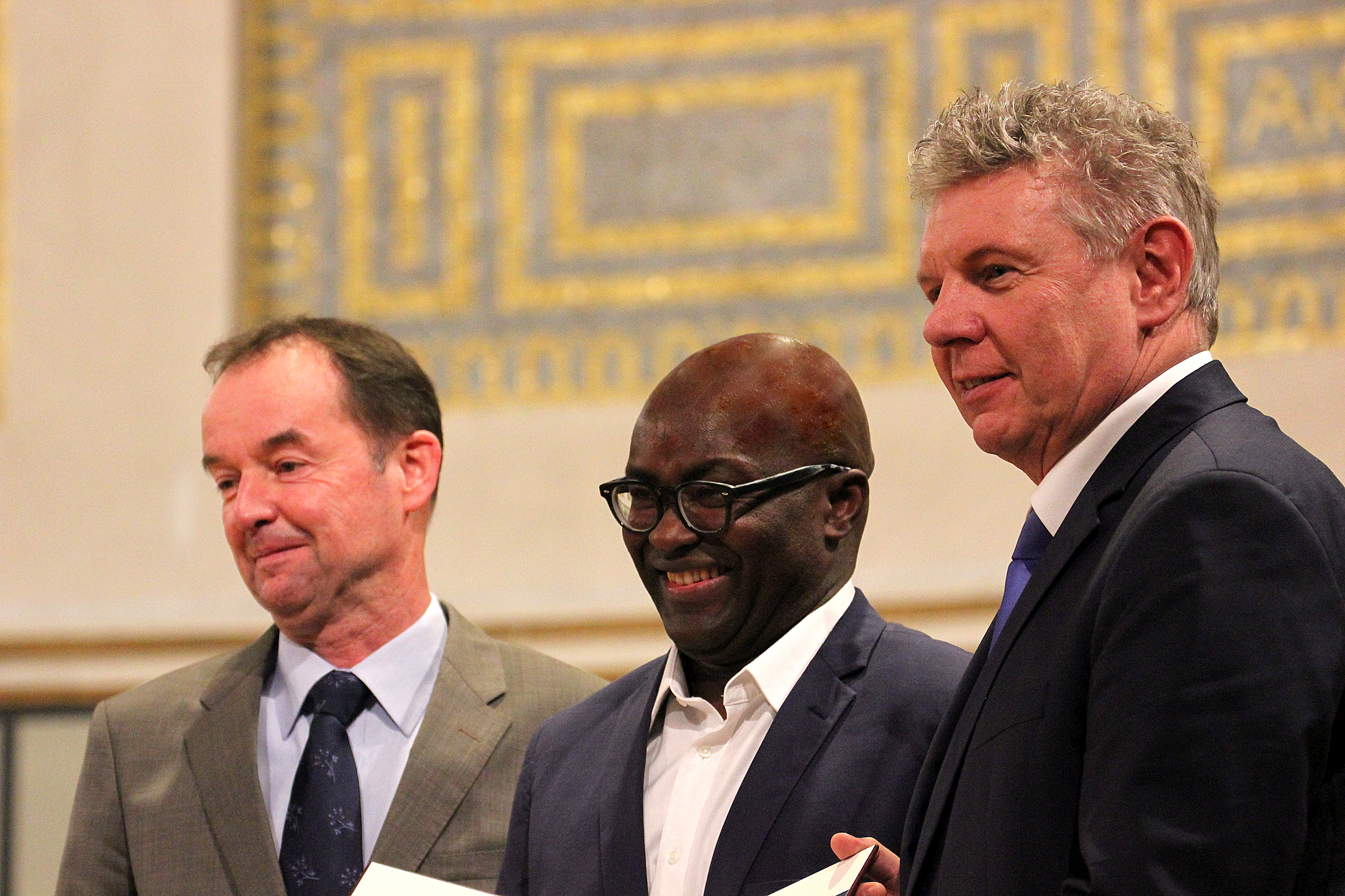 Verleihung des Geschwister-Scholl-Preises 2015 an Achille Mbembe durch Michael Then, Vorsitzender des Börsenvereins des Deutschen Buchhandels - Landesverband Bayern e. V. (links) und Dieter Reiter, OB der Landeshauptstadt München (rechts).